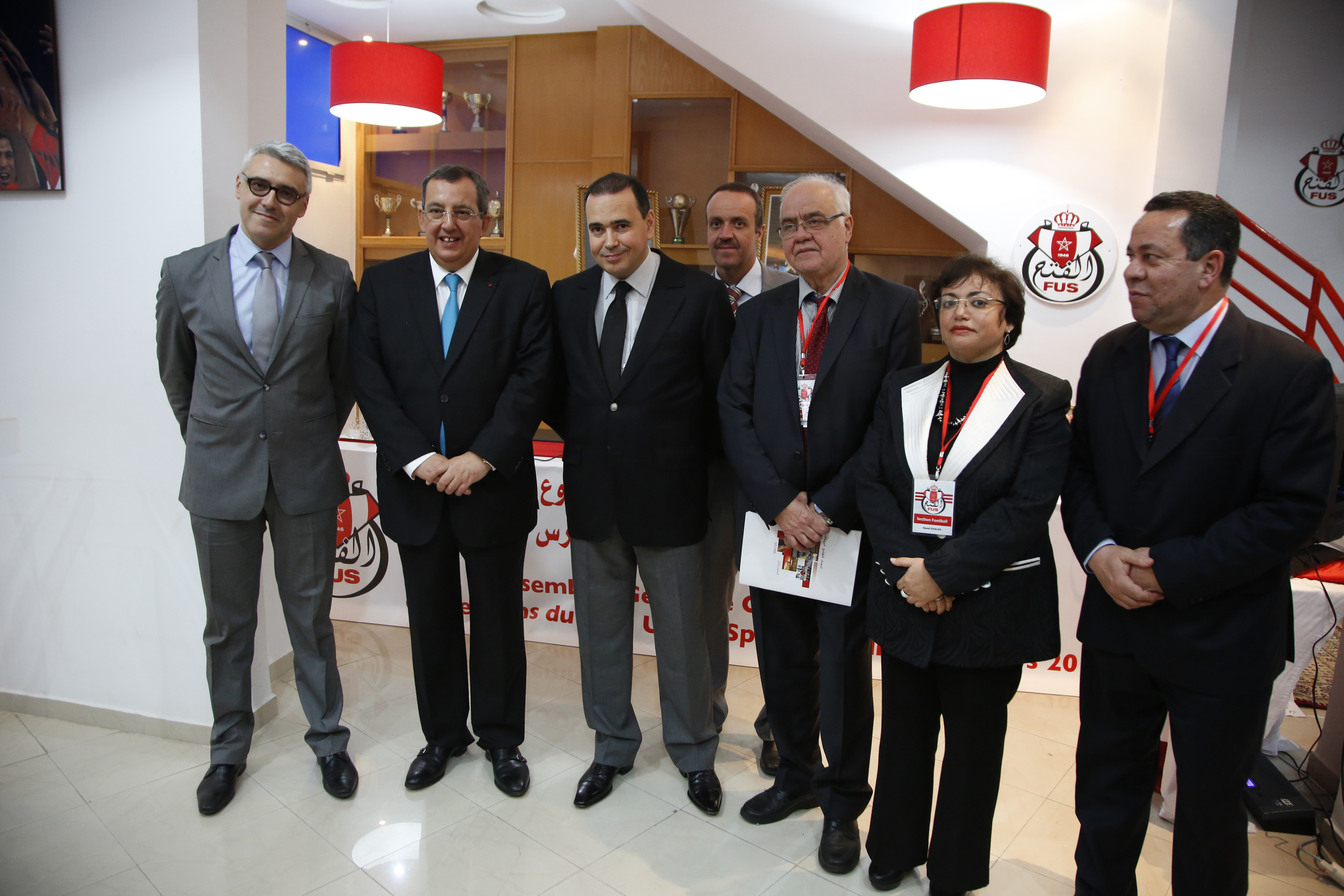 Mounir Majidi, Secrétaire particulier du roi du Maroc et Président du Fath Union Sport de Rabat, lors d'une cérémonie organisée au sein de l'association sportive